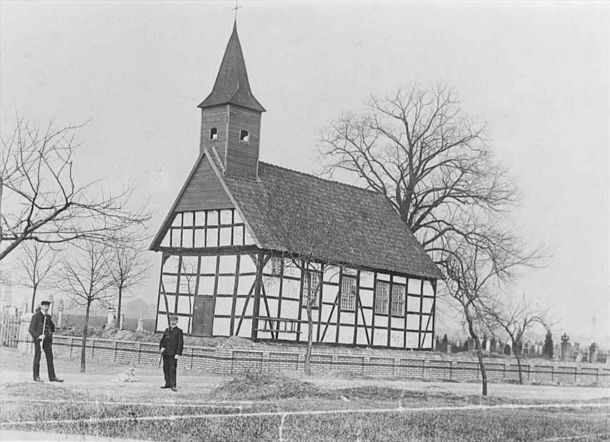 Die alte Oppenweher Klus um die Jahrhundertwende